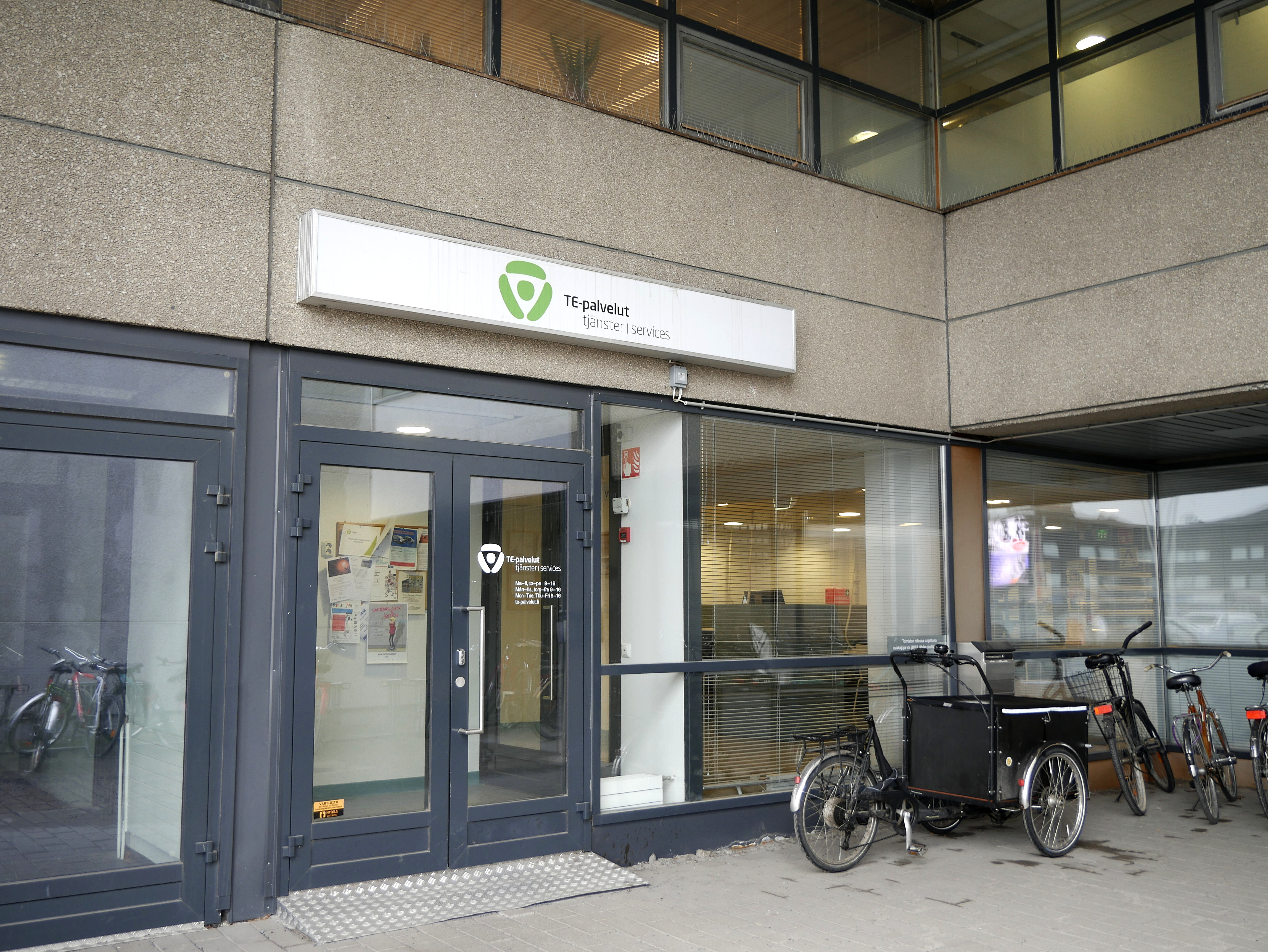 Työ- ja elinkeinotoimisto Seinäjoella.